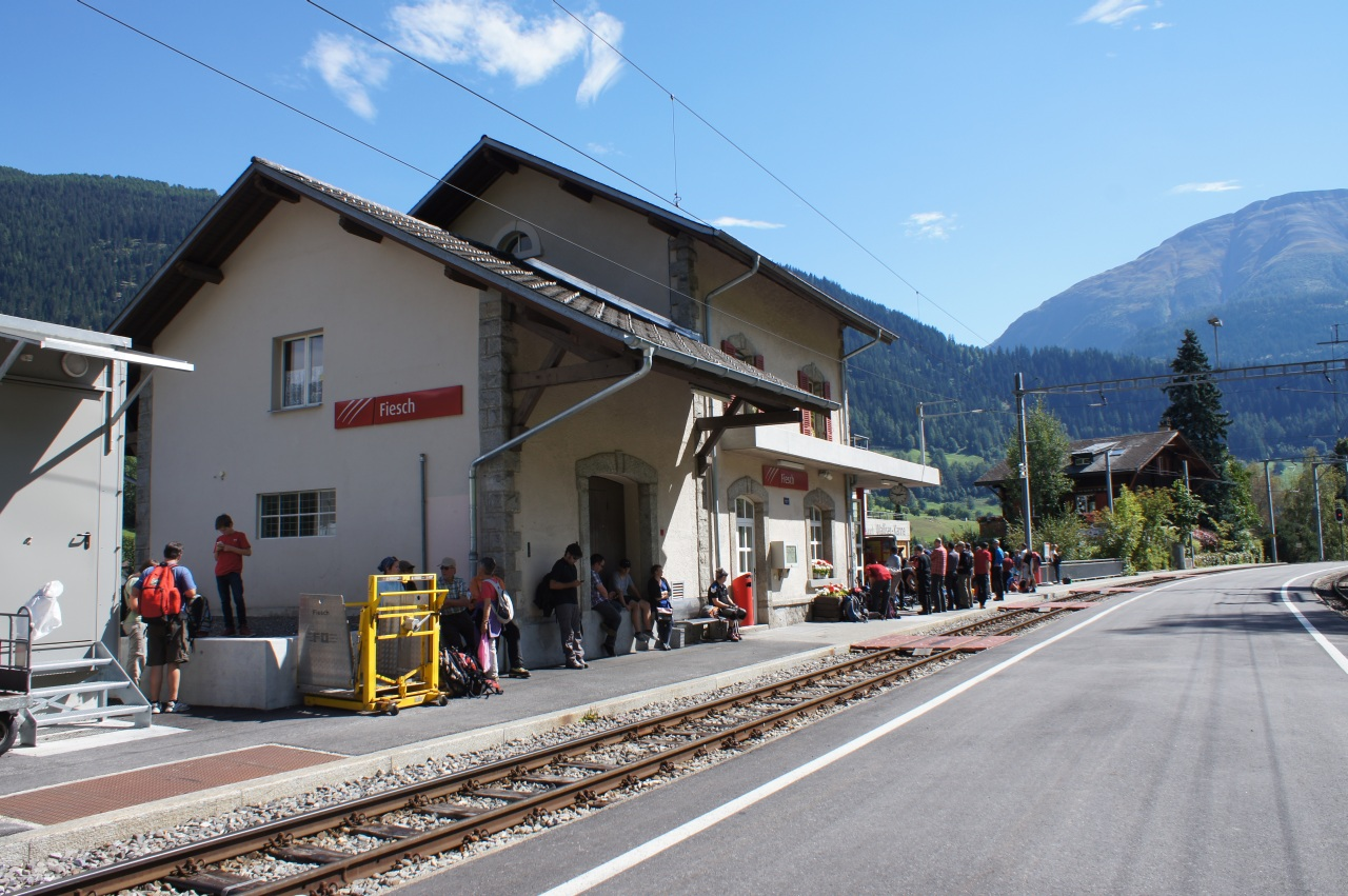 Bahnhofsgebäude Fiesch der MGB mit breitem Mittelperron auf Höhe Null